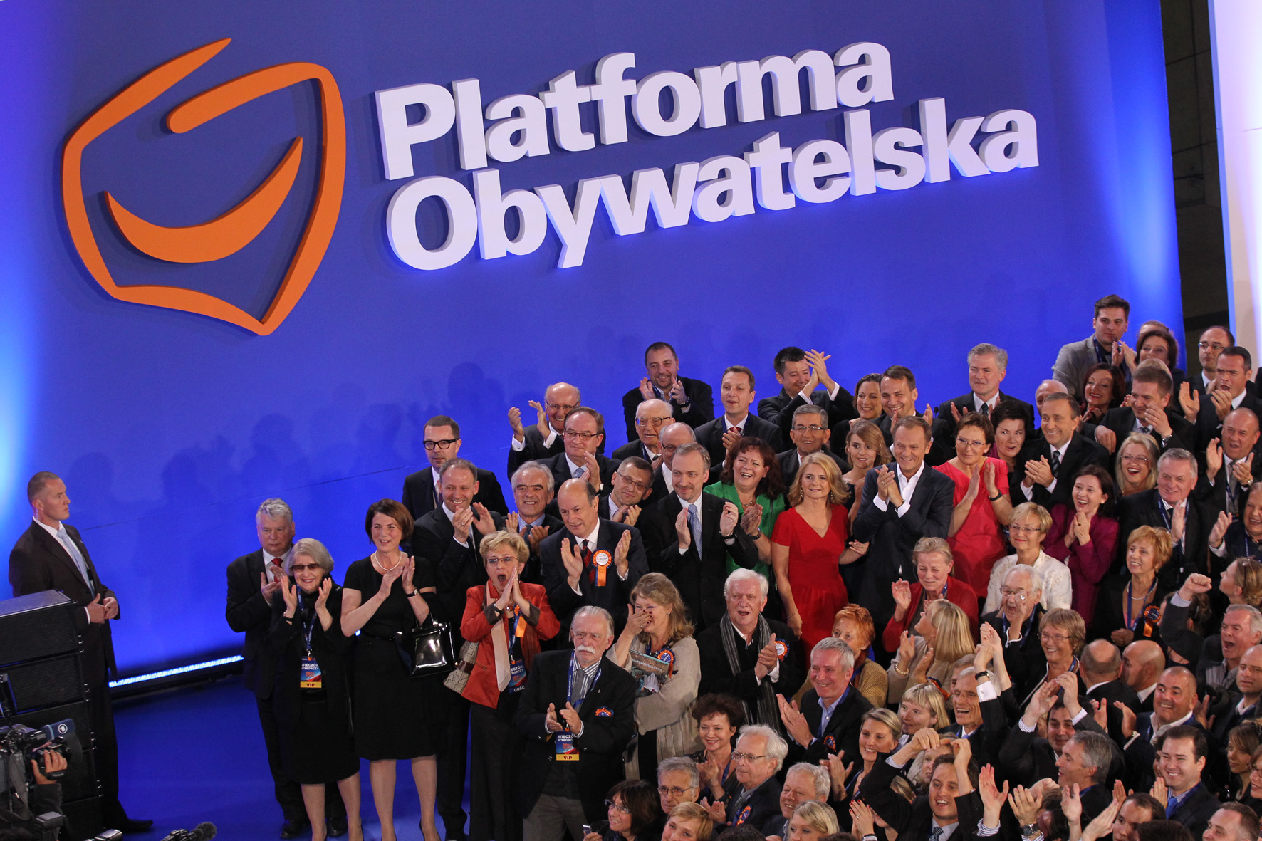 09.10.2011, Wieczór wyborczy w Centrum Biurowym Focus. Platforma Obywatelska zwyciężyła w wyborach parlamentarnych